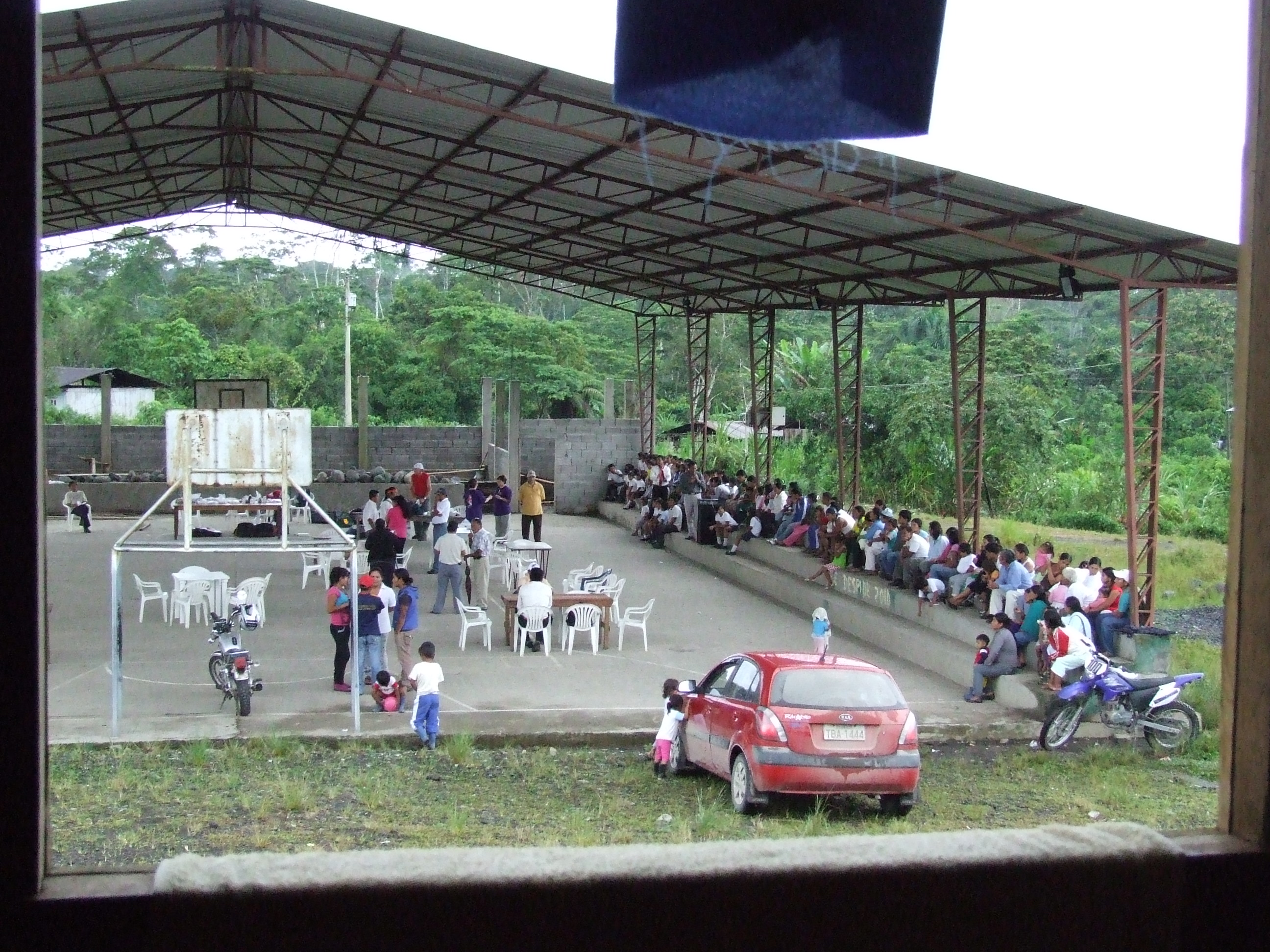 Überdachter Dorfplatz einer Shuar-Comunidad